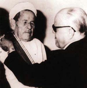 Habib Bourguiba, président de la République tunisienne, décore Bahri Barbouche